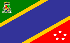 Copia exacta de la bandera original de la Ciudad de Ancud - Chile